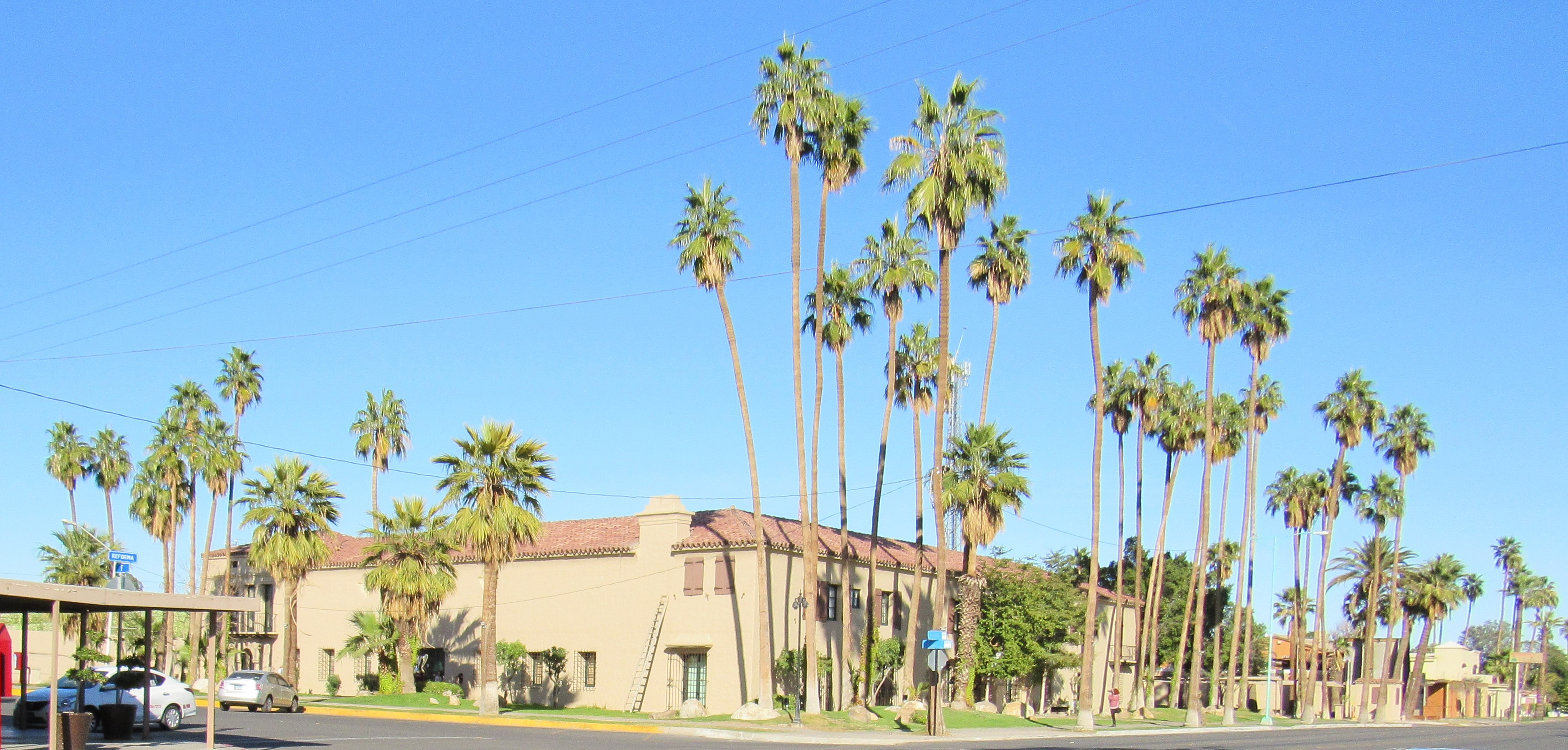 Edificio de la Colorado River Land Company a inicios del 2018, ubicada en la ciudad de Mexicali n Av. Reforma y Calle F. Segunda Sección.